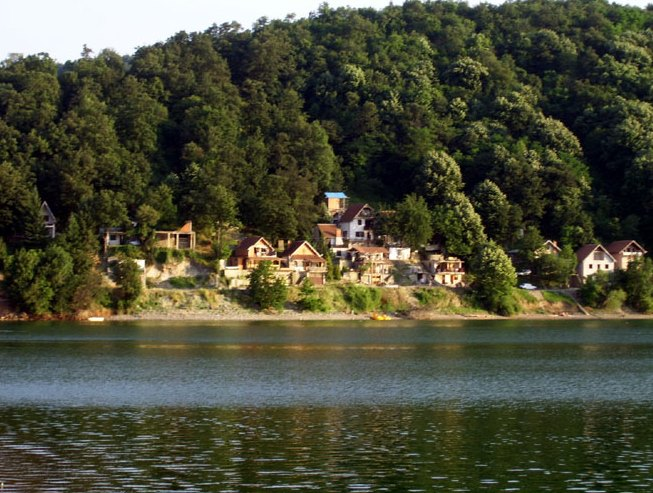 Un village au bord du lac. Villas au bord du lac Bovan. Srpskohrvatski / српскохрватски: Vikendice.